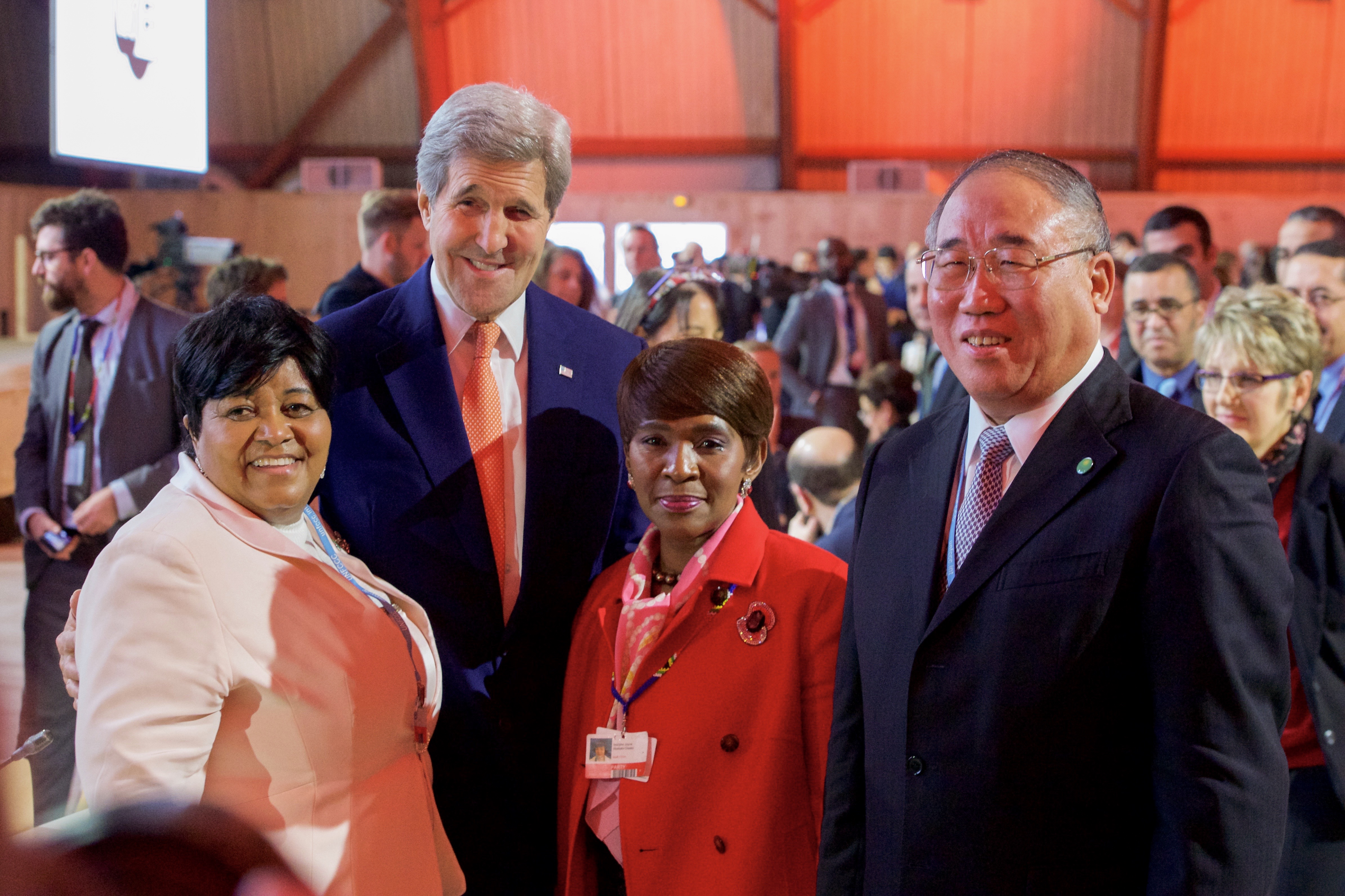 John Kerry, secrétaire d'État des États-Unis, pose avec la ministre sud-africaine de l'environnent Edna Molewa, la représentante du G-77 et ambassadrice sud-africaine Nozipho Mxakato-Diseko ,et l'envoyé spécial de la Chine pour les négociations sur le climat Xie Zhenhua dans le hall de la COP21 à Paris/Le Bourget (conférence sur le climat) le 12 décembre 2015 [State Department photo/ Public Domain]